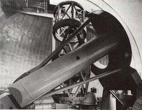 Télescope 200 inch du Mont Palomar